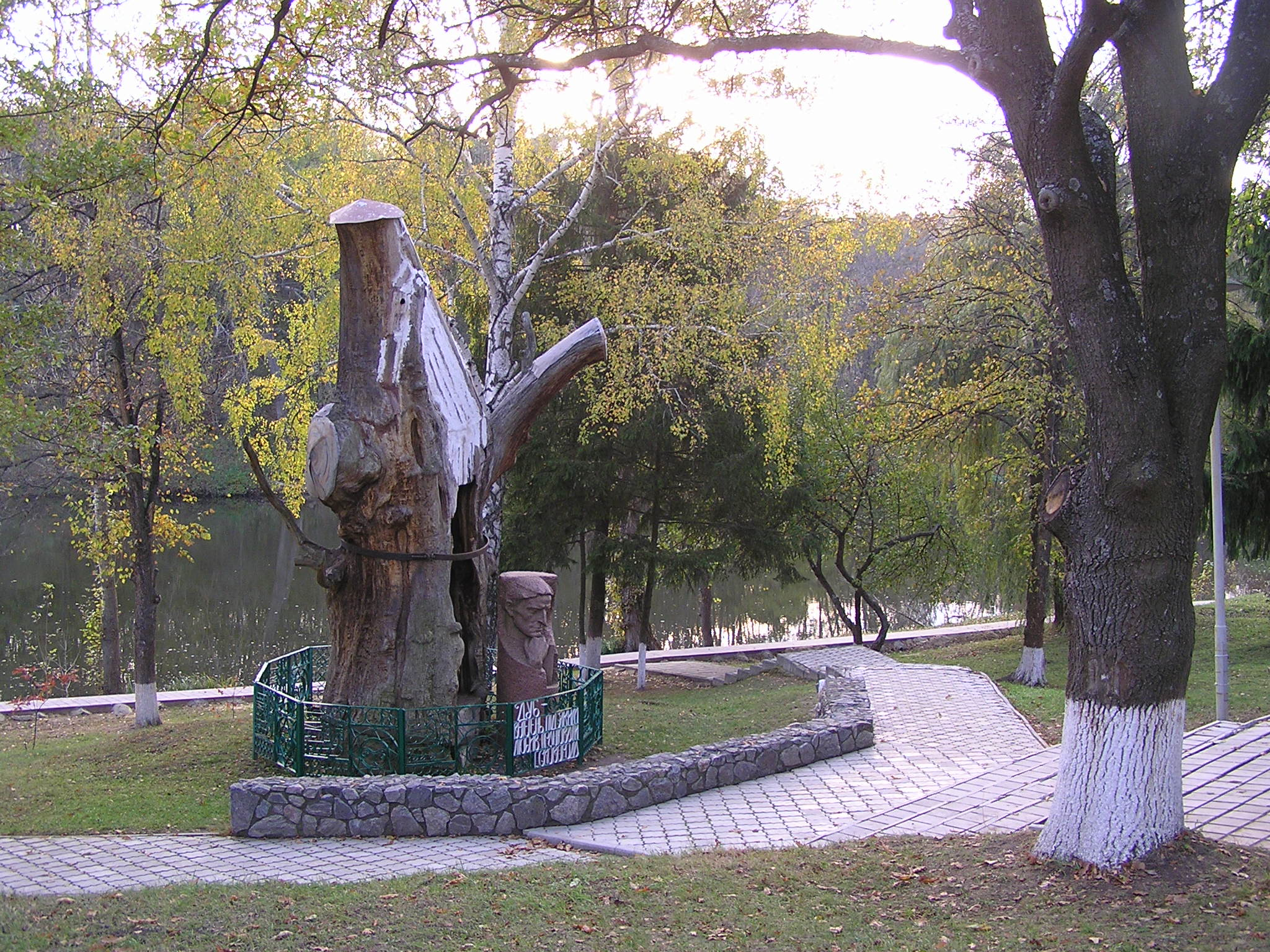 Меморіальний комплекс філософа і поета Г. С. Сковороди, вулиця Приозерна, 3, с.Сковородинівка, Золочівський р-н., Харківська обл.